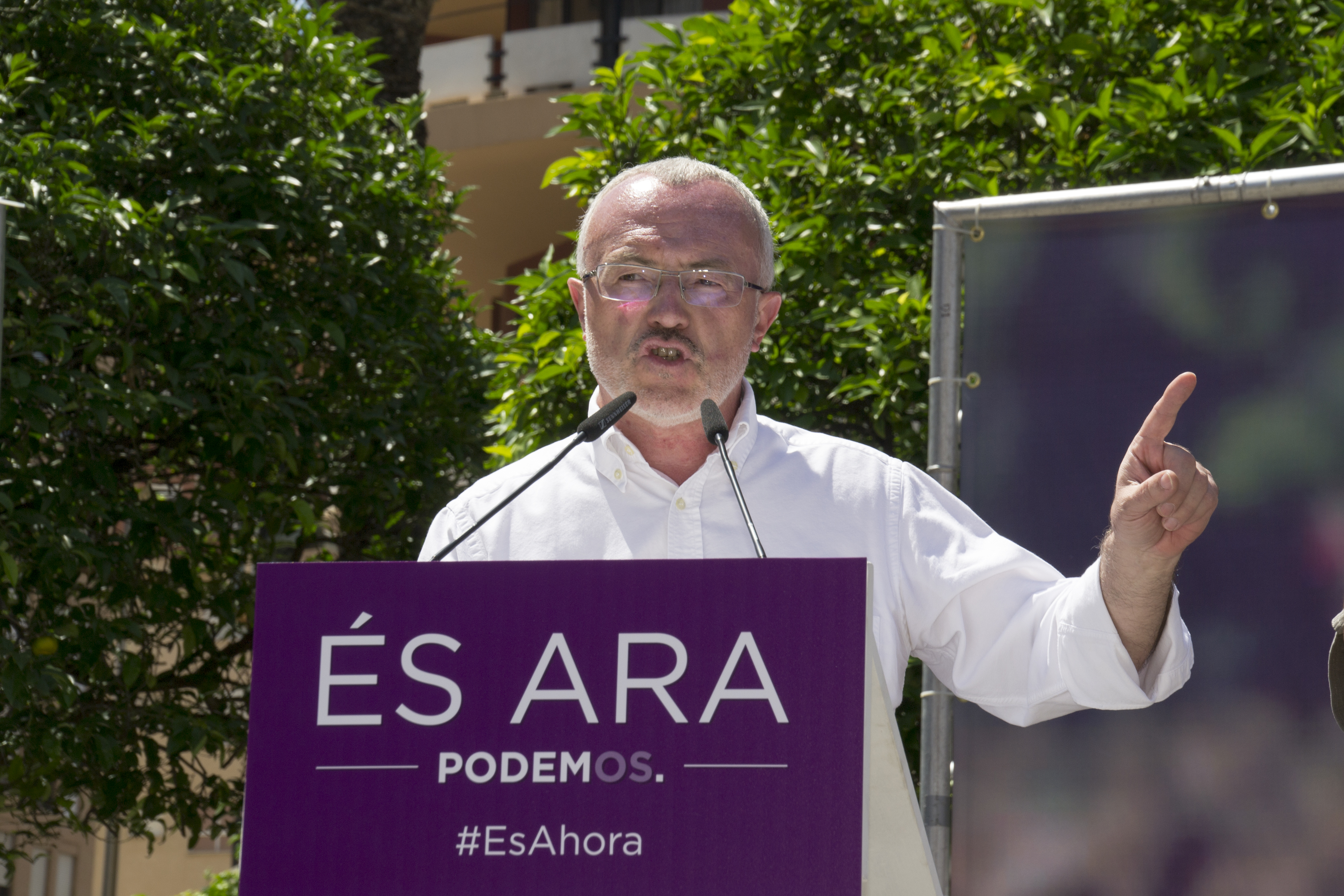 2015-05-10 Acte Electoral de Podem a Alzira